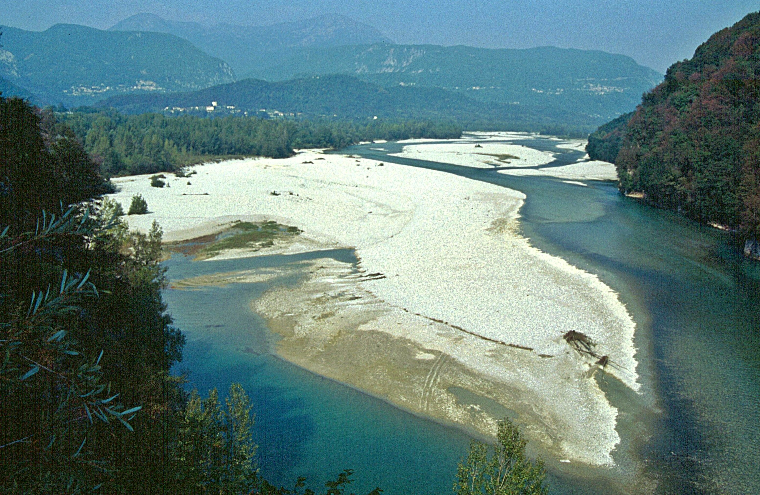 Tagliamento